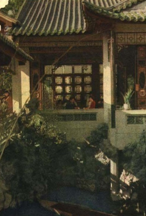 1962-04 1962年 广州茶楼